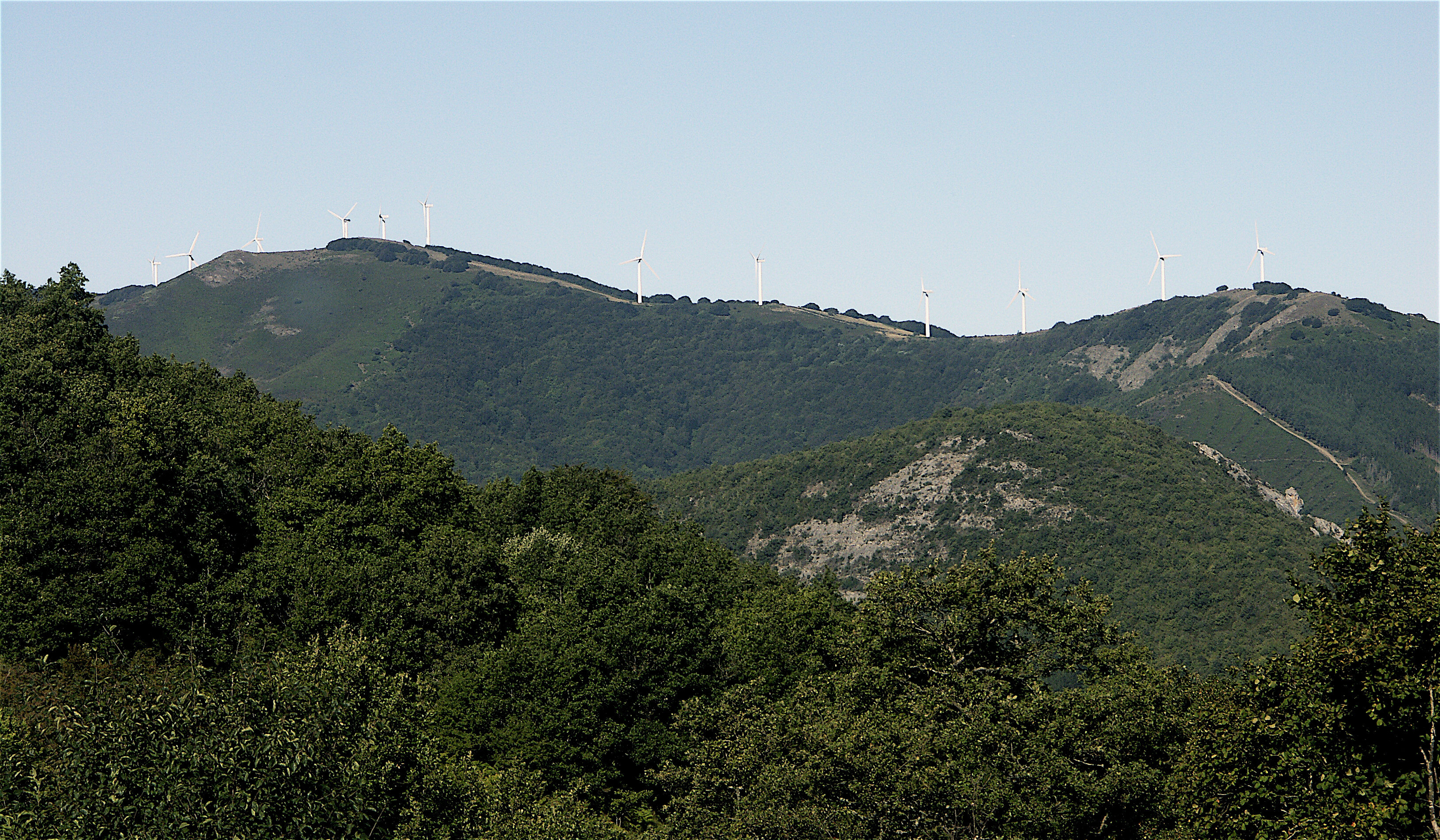 Eoliennes du Merdelou (Peux-et-Couffouleux - Aveyron - France)